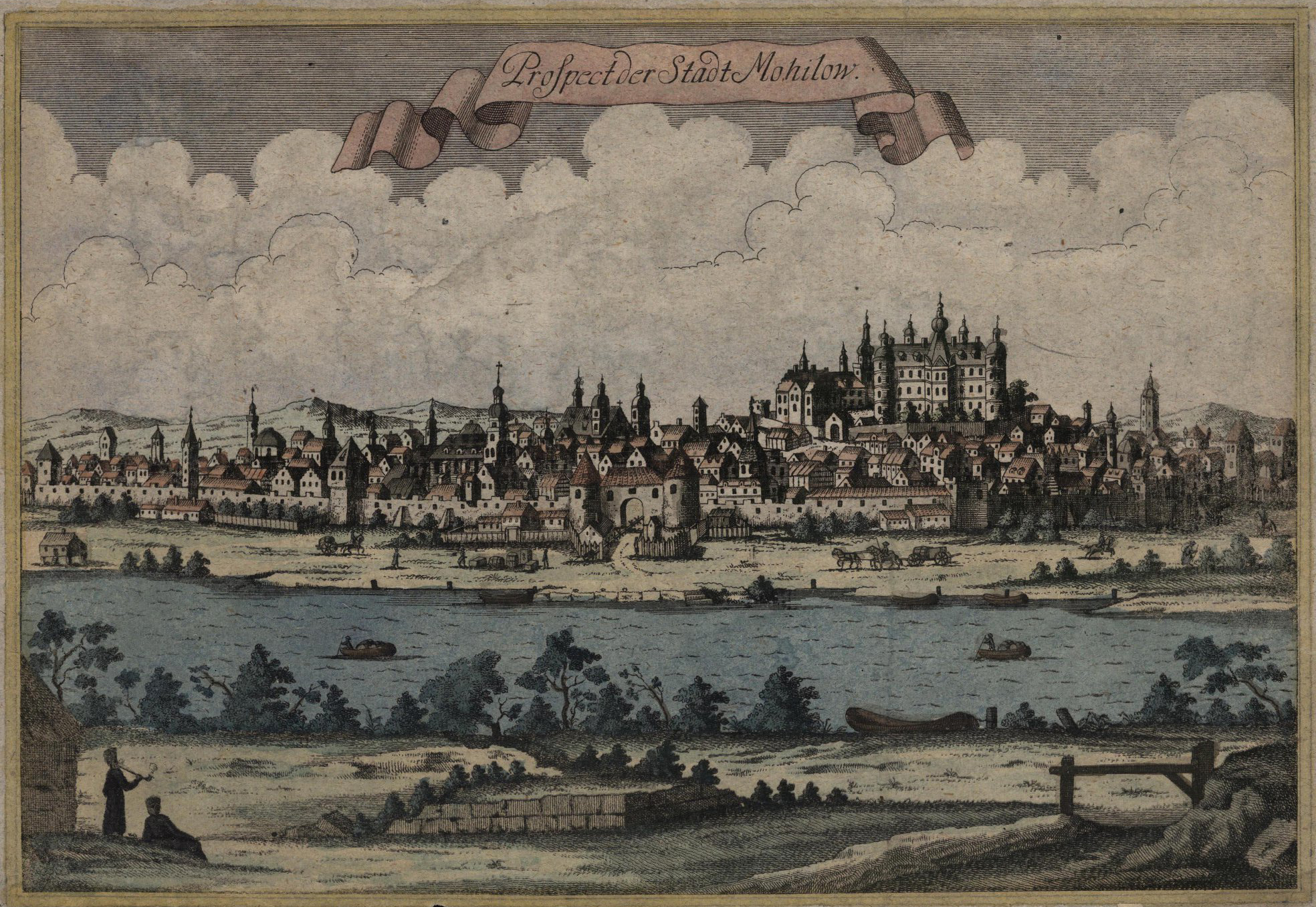 Беларуская (тарашкевіца): Магілёў (Mahiloŭ). Панарама места